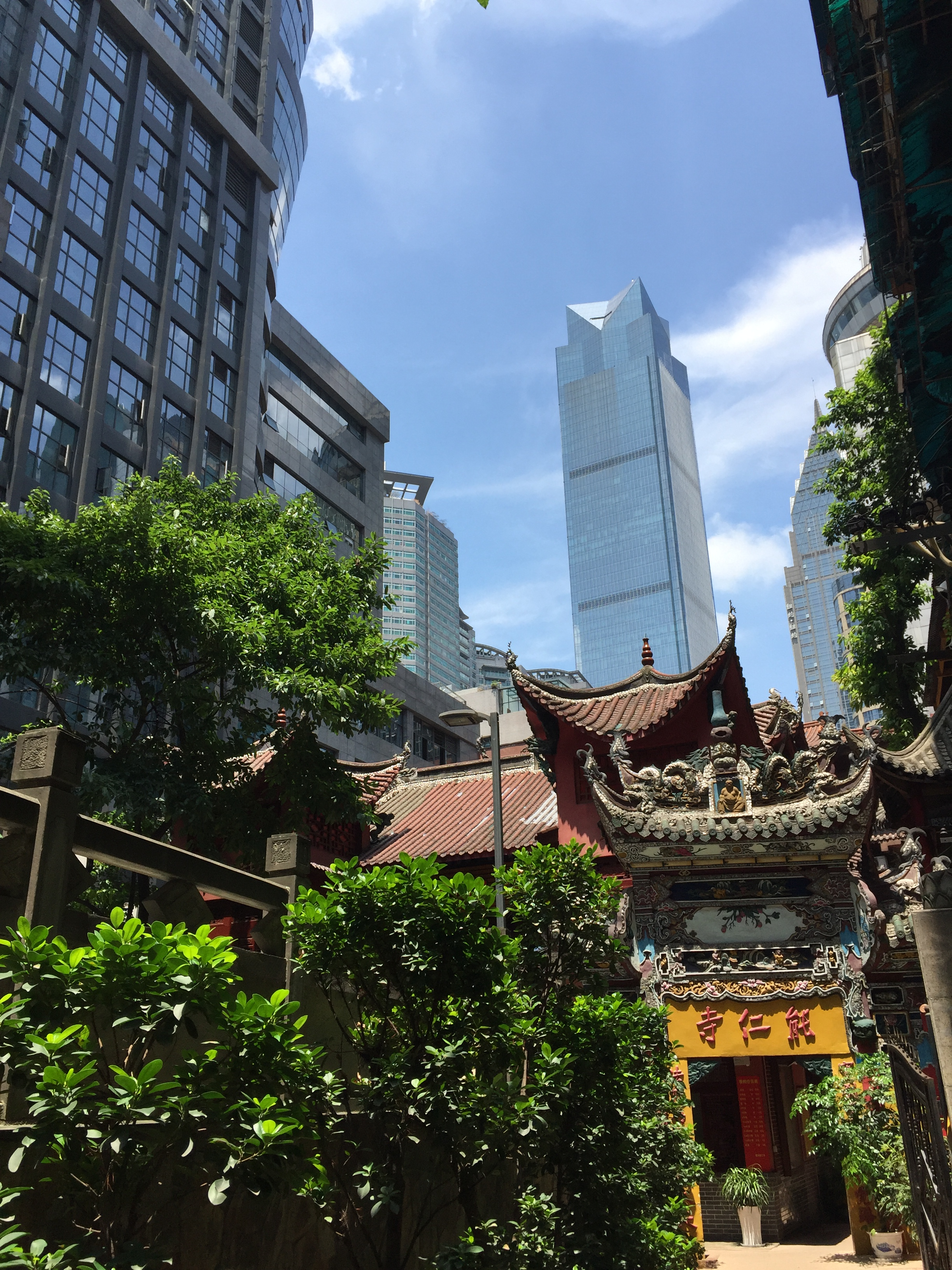 中文（中国大陆）: 重庆能仁寺